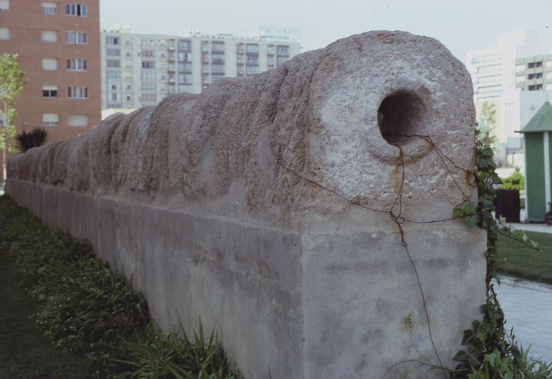 Tubería de piedra procedente del acueducto de Cádiz. En la actualidad está reconstruida fuera de su emplazamiento original.